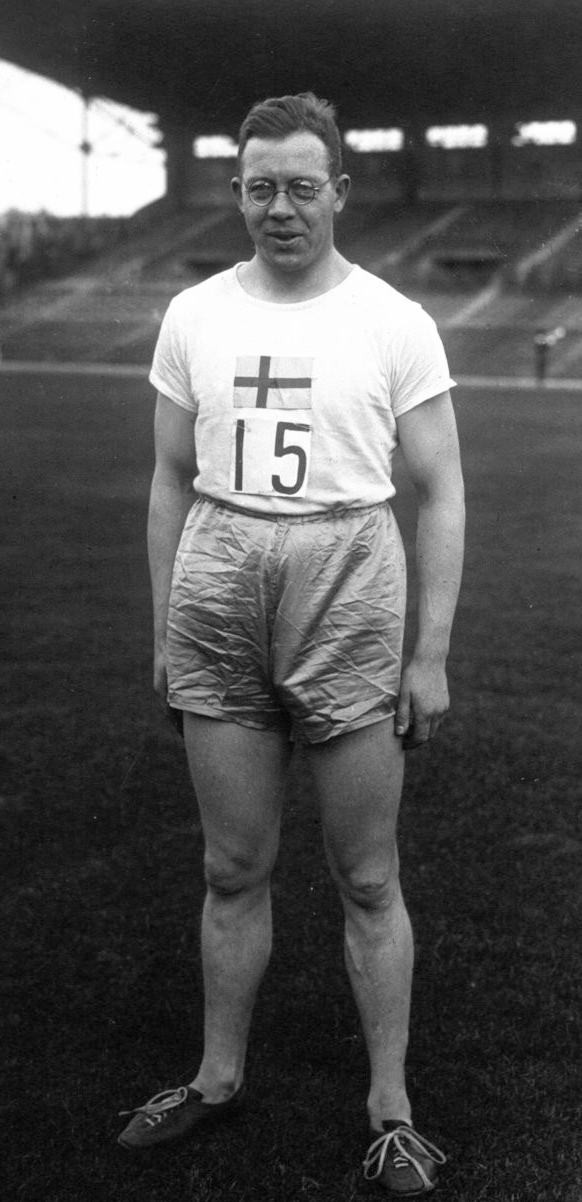 Suède-France athlétisme : lancement du poids : B. Jannsson : [photographie de presse] / Agence Meurisse